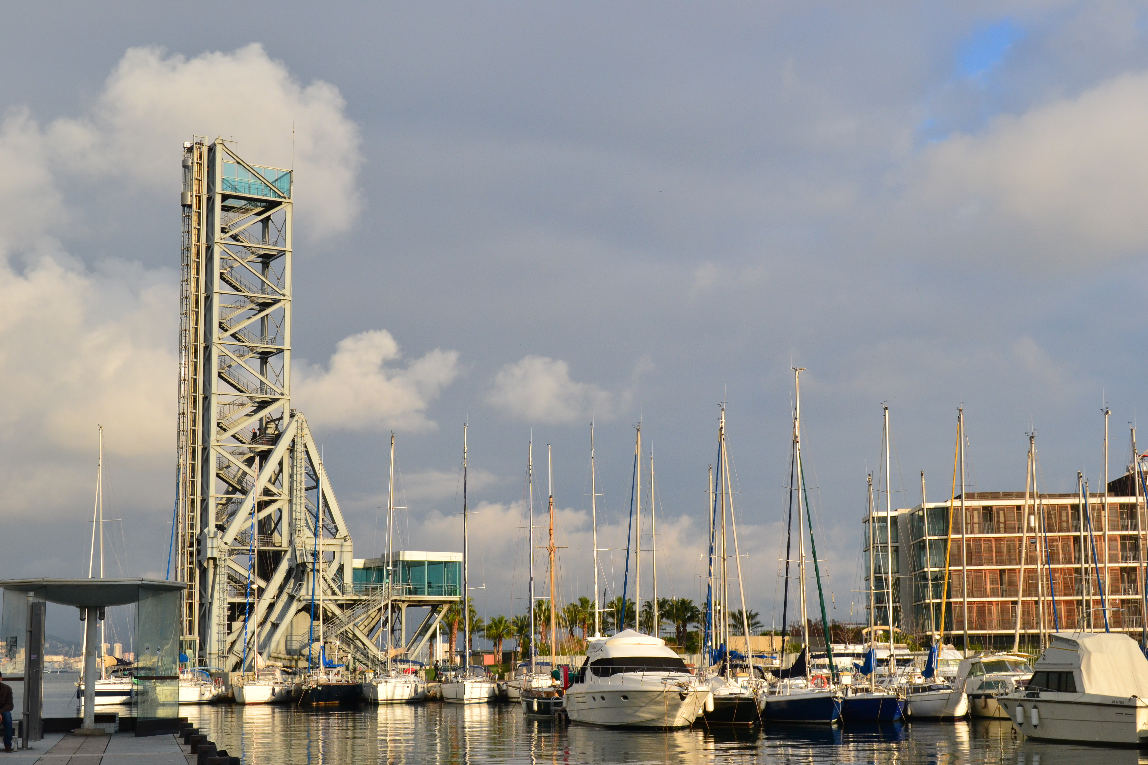 L'ancien pont levant des chantiers navals de La Seyne-sur-Mer, aujourd'hui reconverti en tour panoramique dotée d'un ascenseur. À droite, l'hôtel Kyriad Prestige.